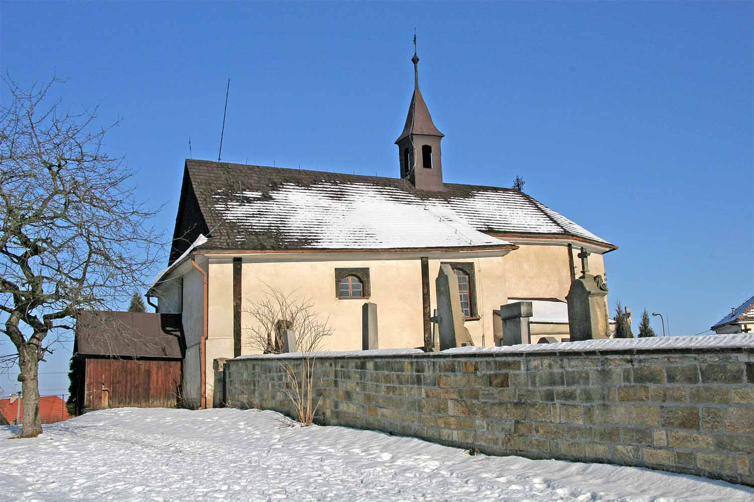 Kostel Svatého Václava v Měníku